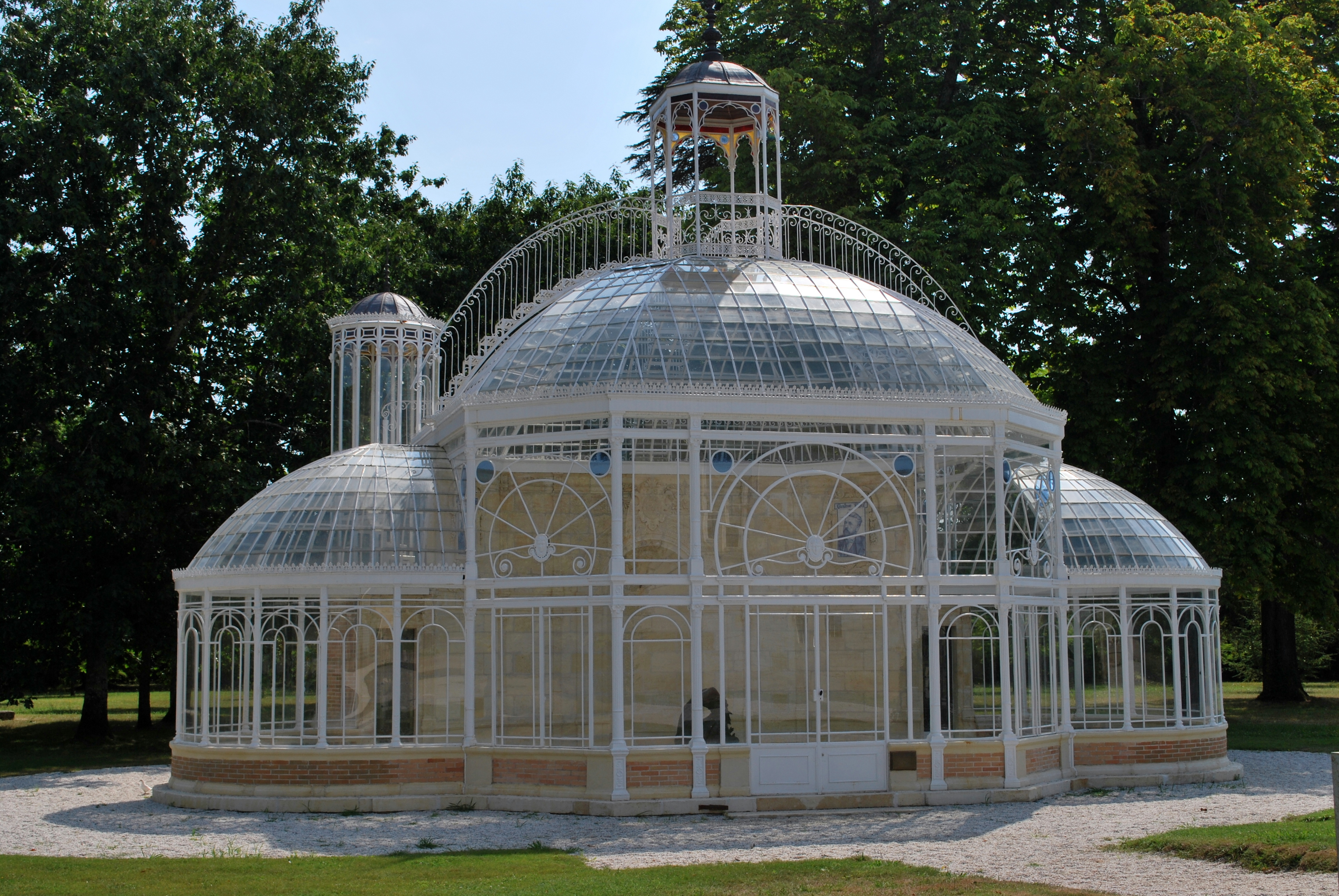 Gradignan Serre du château Malleret (Cadaujac)